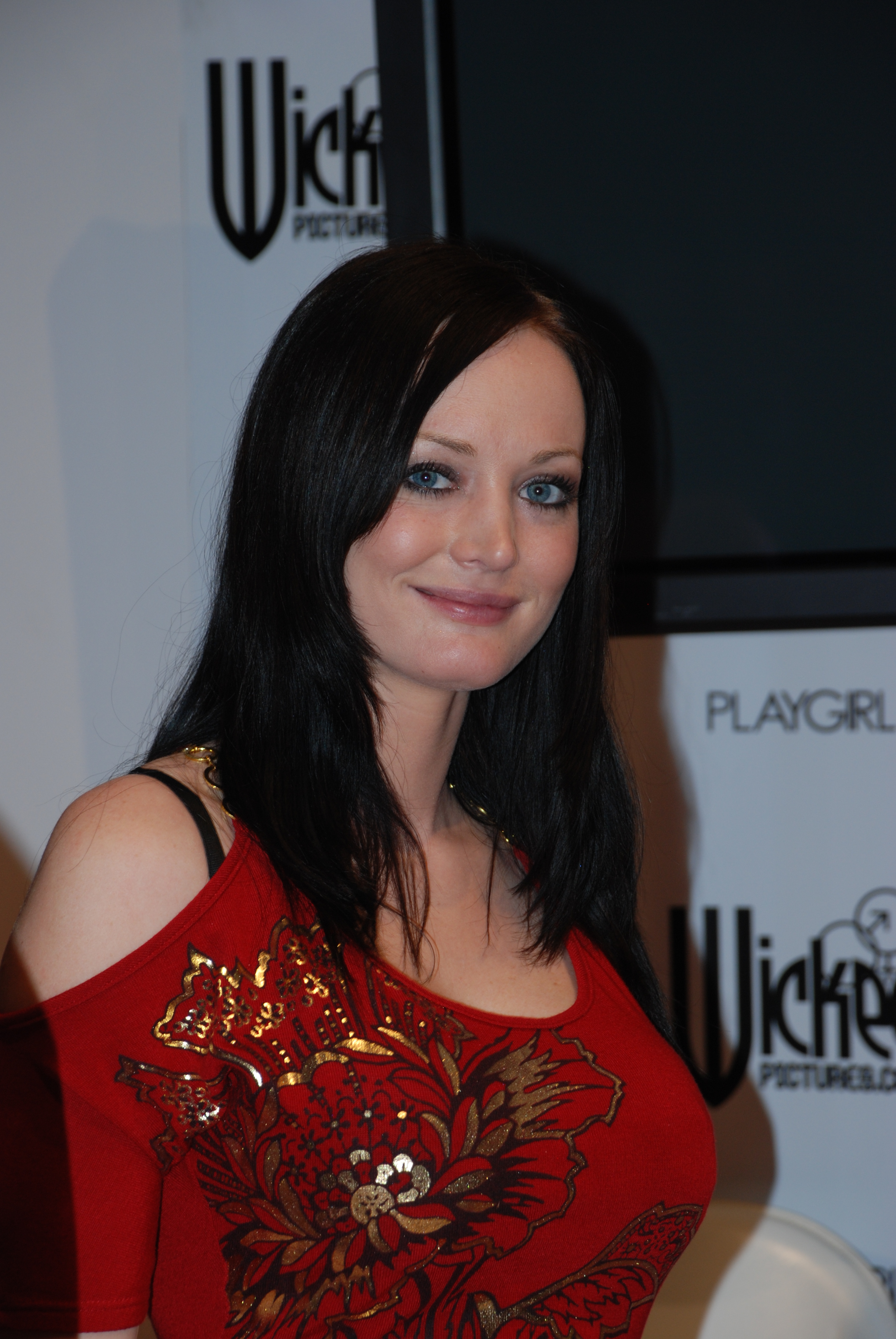 AEE2009_Jan10_Nikon 426